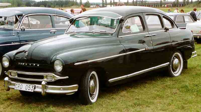 Ford Vedette Fordor Sedan 1954